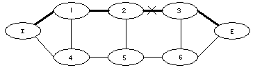 Rysunek sporzadzony w celu wyjasnienia technik wznawiania pracy w sieciach GRID